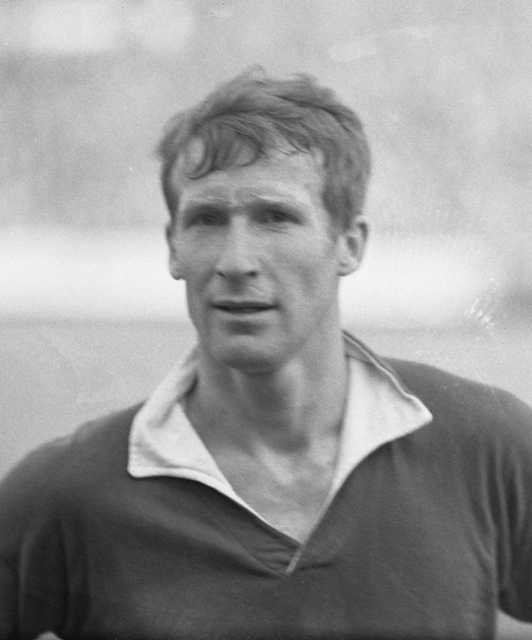 Allemann (PSV), Zwitserse international